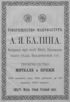 Баннер